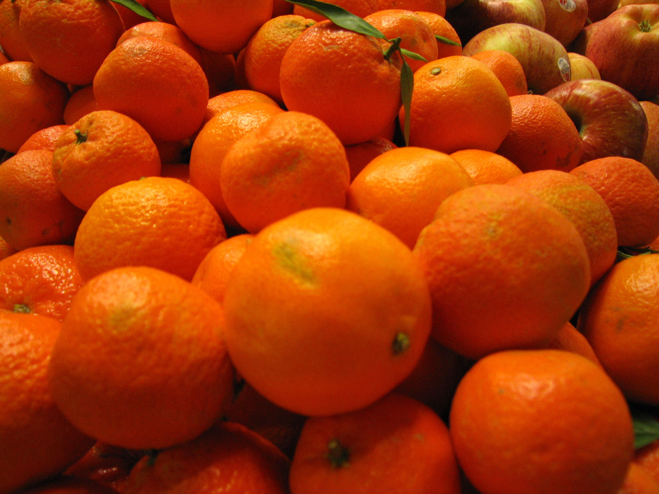 Mandarin OrganesTangerine